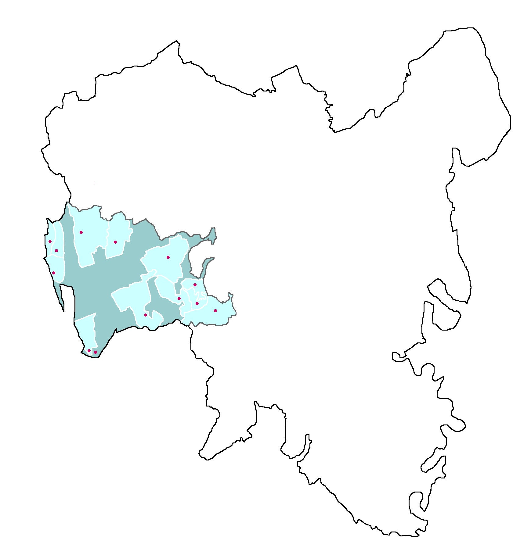 Újdombóvár község közigazgatási területe (sötétebb színnel) a Dombóvári járáson belül 1912-ben